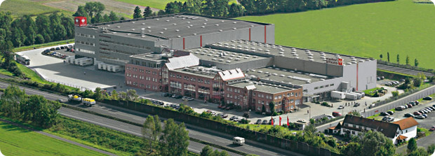 engelbert strauss Firmengelände